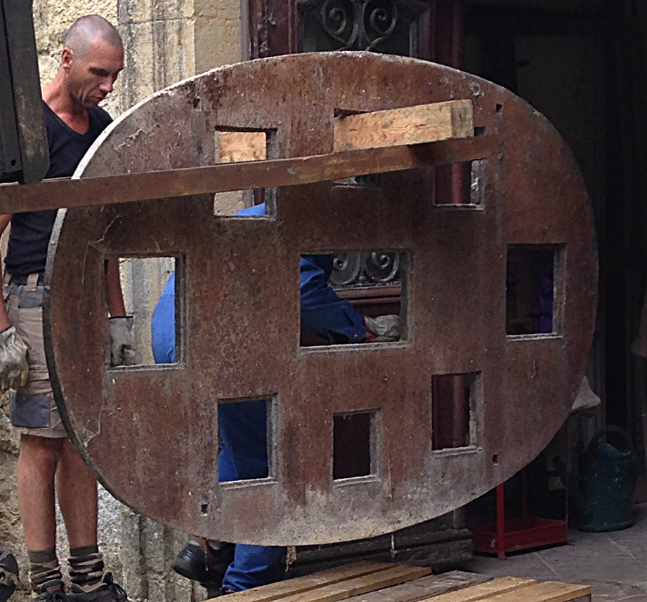 Platine de fonte du potager de l'ancienne abbaye de Bellevaux (Haute-Saône), livrée 1787 par les "fourneaux de Larians et de Loulans"